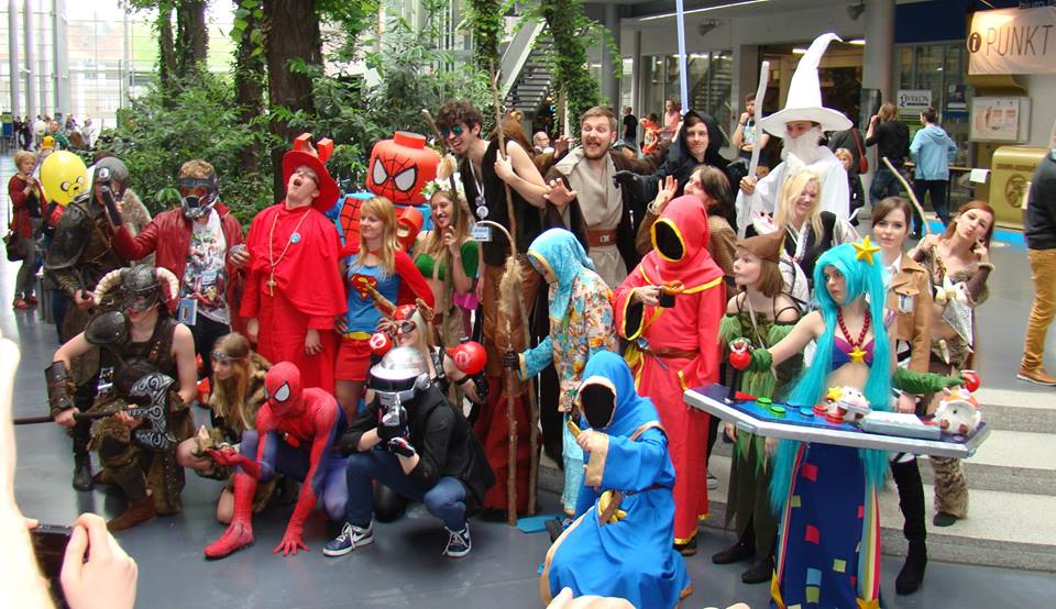 Cosplay na Pyrkonie 2015